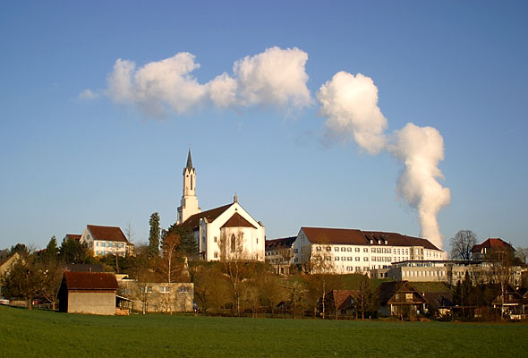 Pfarrkirche und ehemalige Johanniterkommende von Leuggern, im Hintergrund die Kühlturm-Rauchfahne des Kernkraftwerks Leibstadt (5. April 2003)